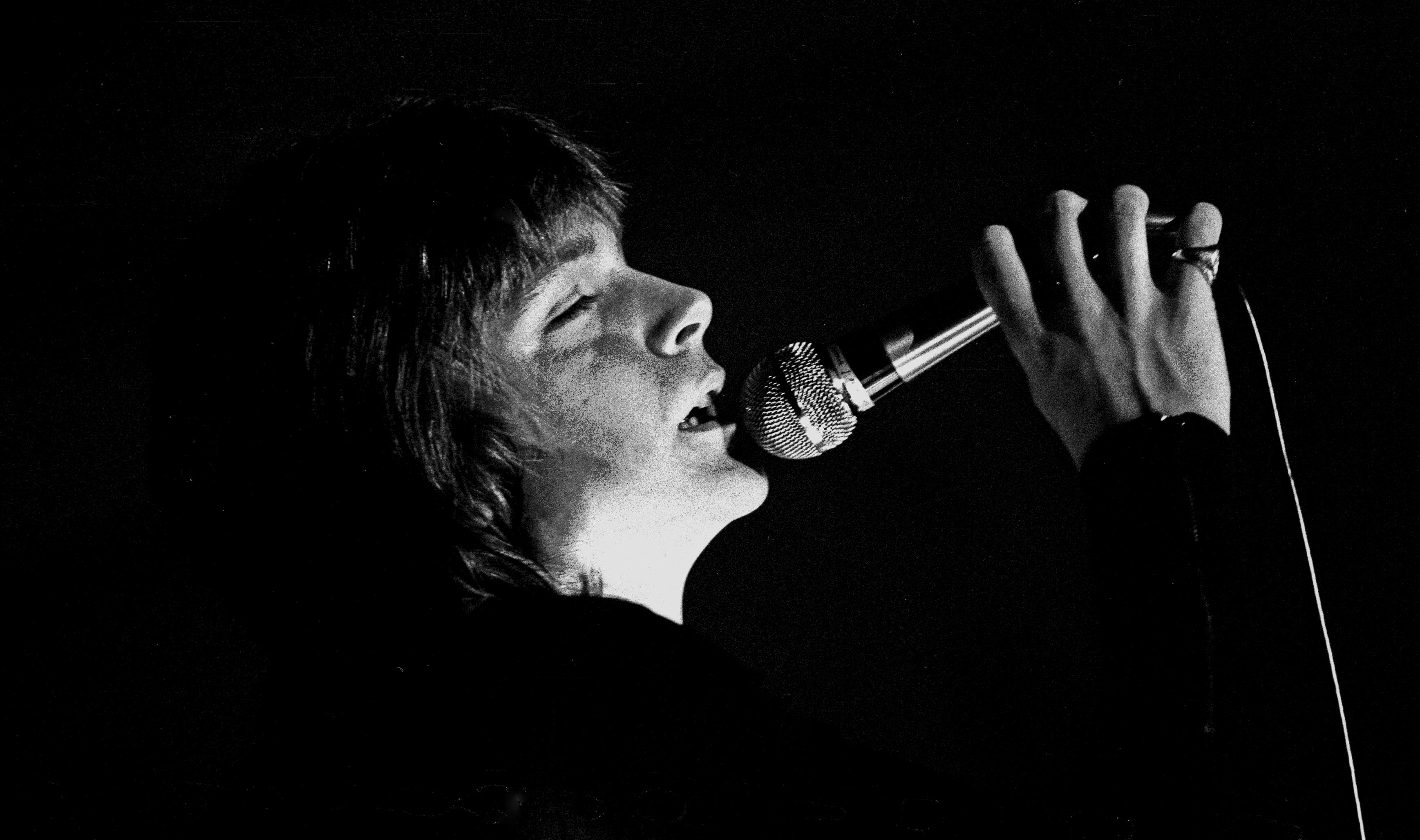 David Cassidy: 1972/73 auf dem Höhepunkt seines Ruhms und dem Gipfel des Erfolgs. Hier beim Auftritt in der Musikhalle Hamburg, März 1973